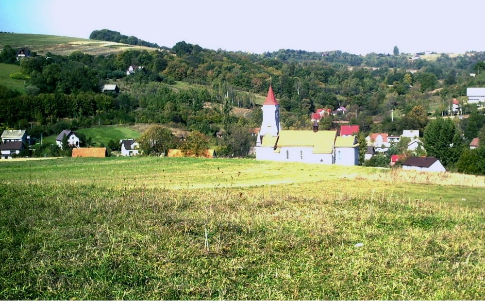 Widok na kosciol w Stryszowie.My own work.X/2006 Suwaj Wladyslaw.(catholic church)